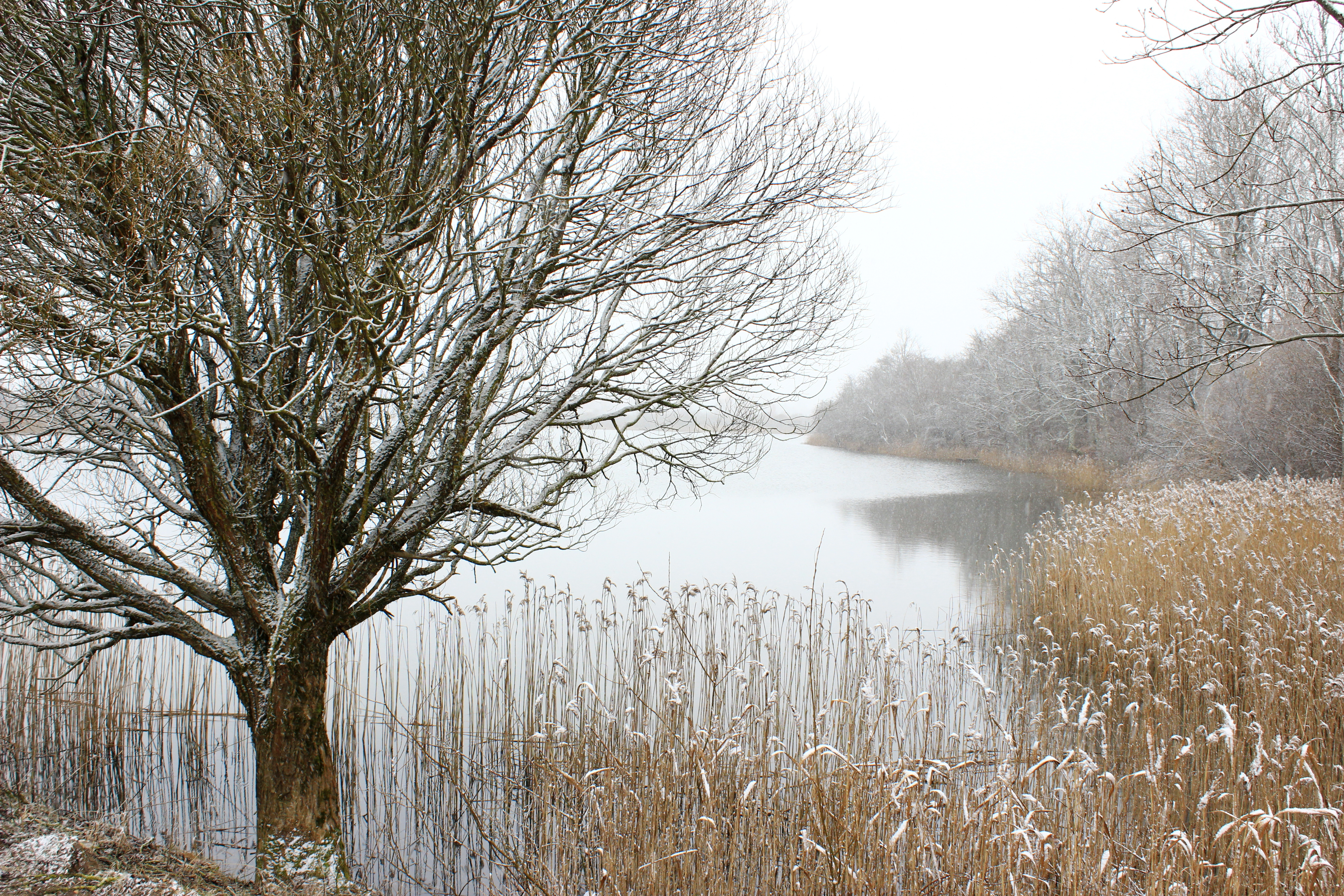 Lažas ūdenskrātuve Aizputē